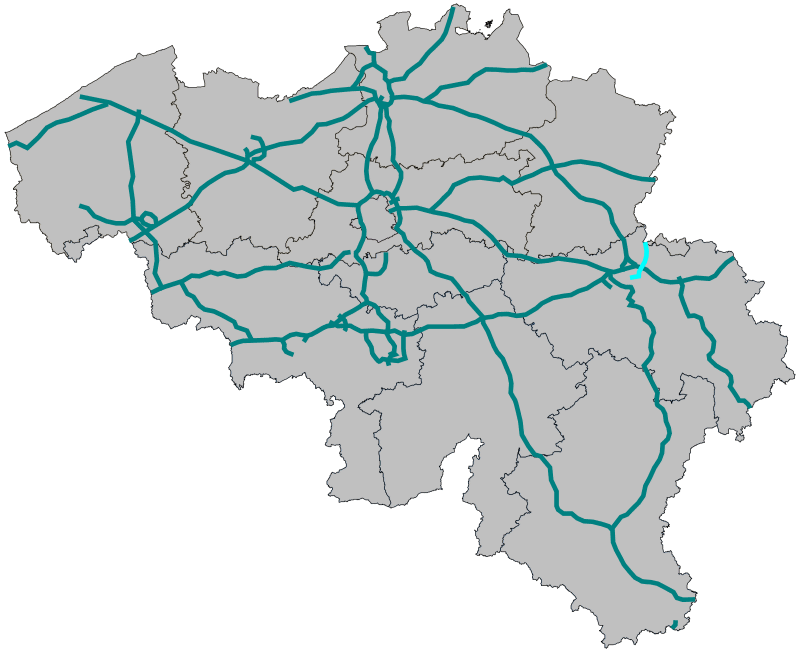 Traject A25 (België)